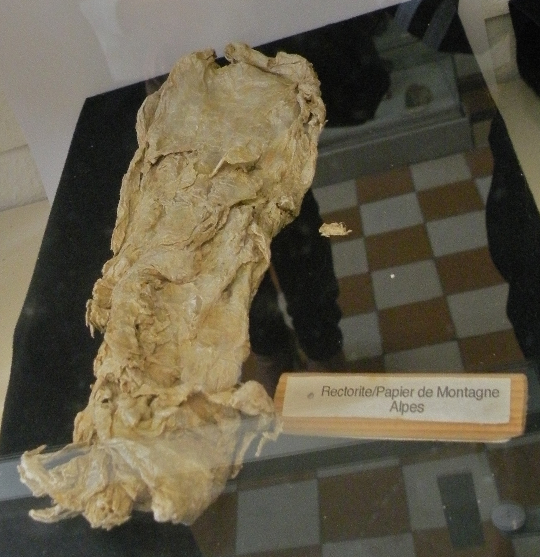 Rectorite